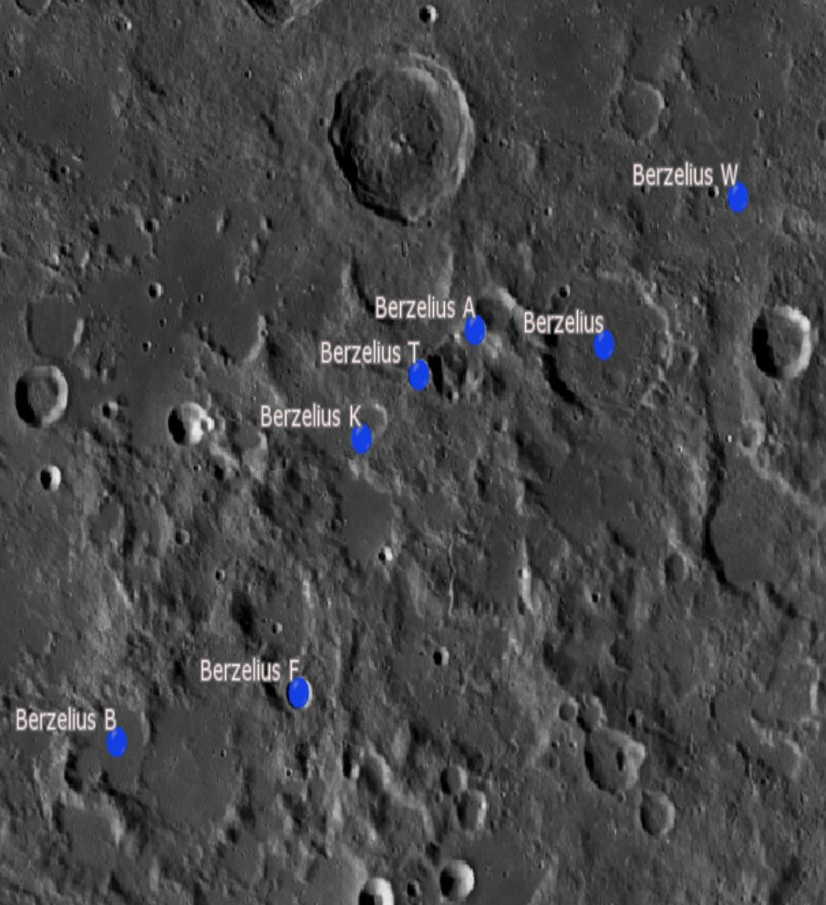 Cráter lunar Berzelius. Cráteres satélite. (Image LRO)